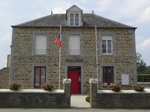 Mairie de Montanel (50).